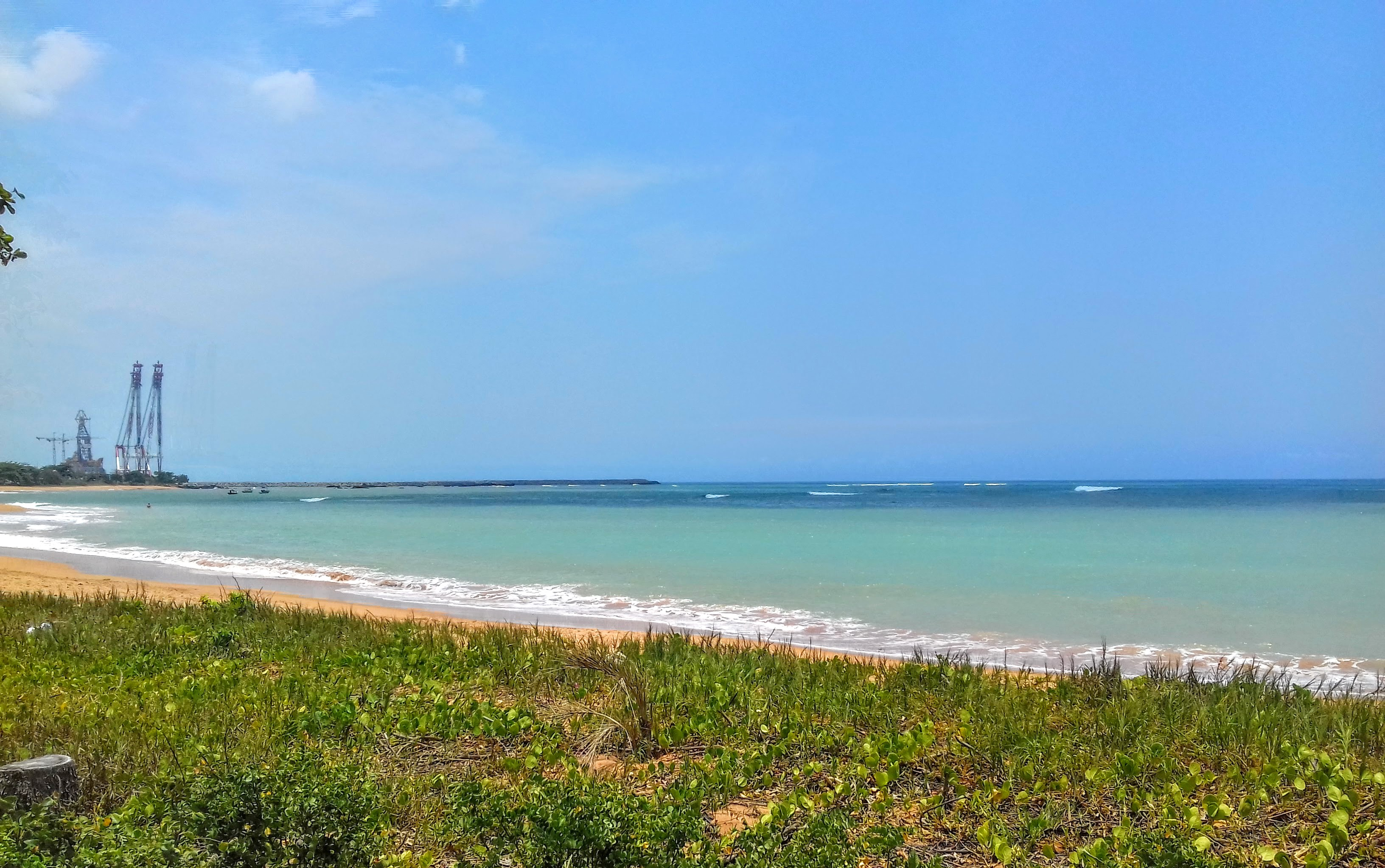 Porto da Jurong sendo contruido ao fundo